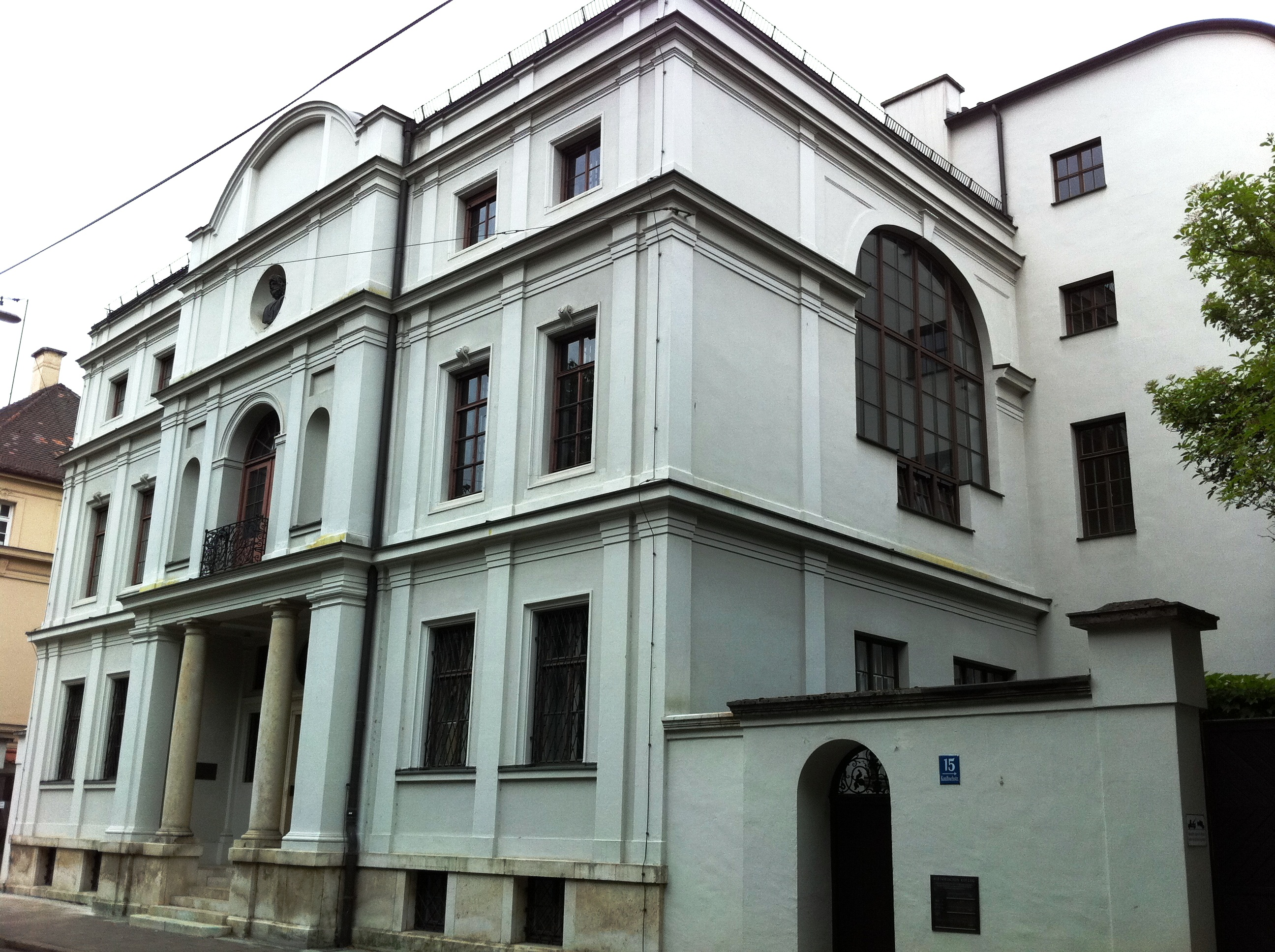 Kaulbach-Villa in der Kaulbach-Straße 15 in München-Maxvorstadt, Regierungsbezirk Oberbayern, Bayern. 1888 durch Gabriel von Seidl errichtetes, ehemaliges Wohnhaus des Malers Friedrich August von Kaulbach. Seit 1988 Sitz des Historischen Kollegs. Das Gebäude ist als Baudenkmal in der Bayerischen Denkmalliste aufgeführt.